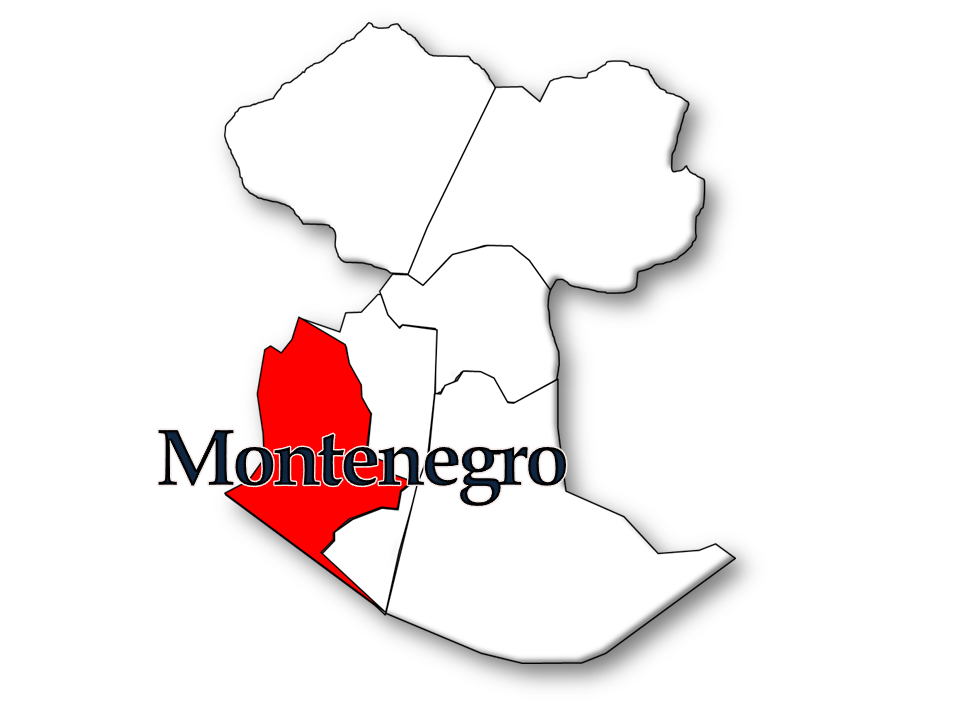 Censos 1864/2011